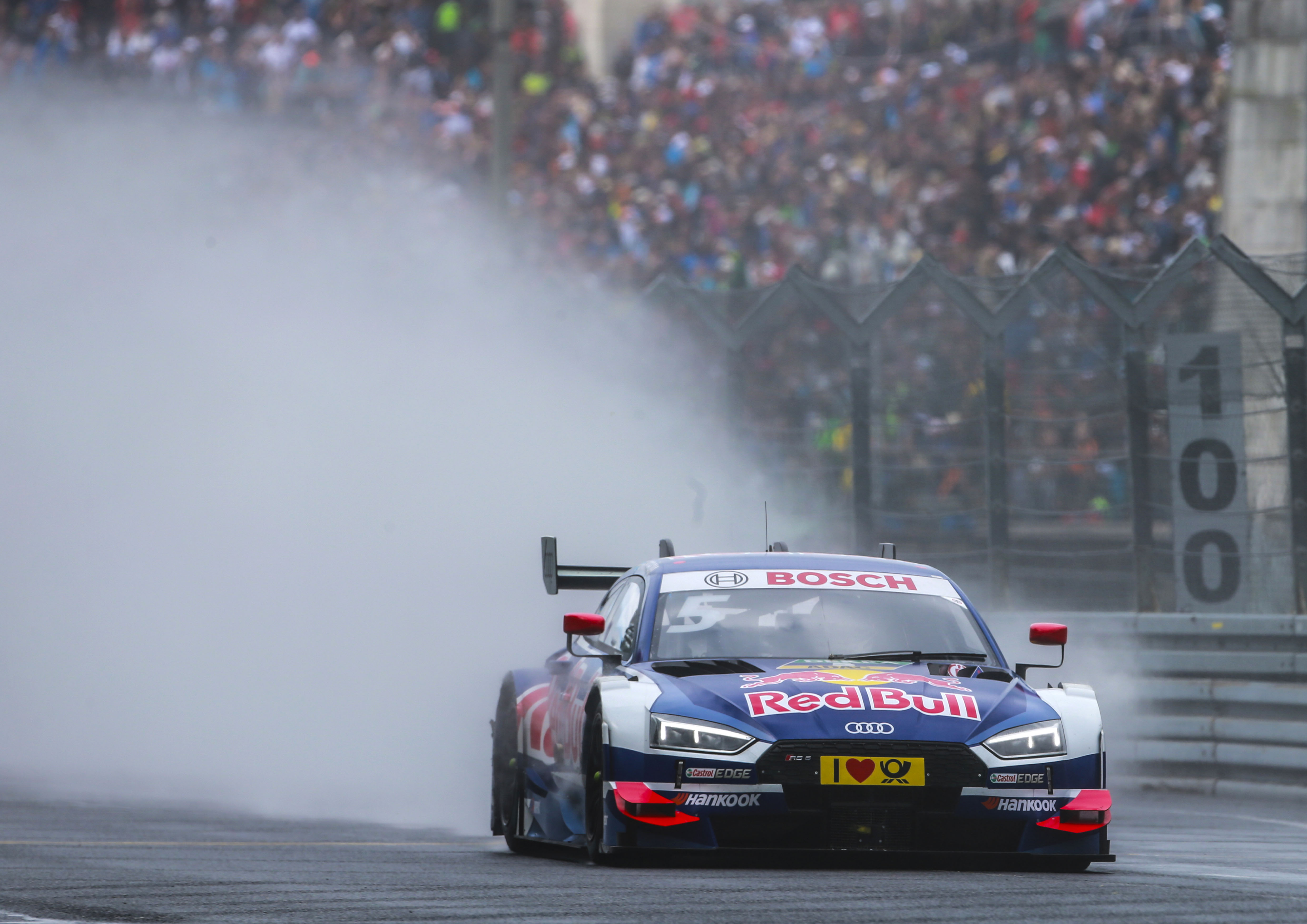 Mattias Ekström (Red Bull Audi RS 5 DTM), DTM Norisring 2017